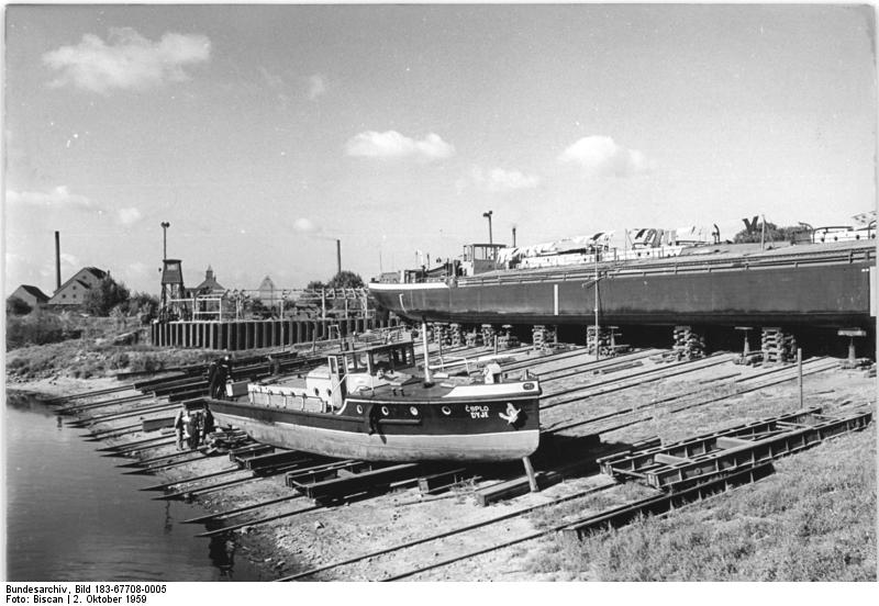 Zentralbild-Biscan We-Ho 2.10.1959 VEB Schiffswerft Rosslau Grösste Binnenwerft Deutschlands. Die Rosslauer Schiffbauer haben nach 1945 mit dem Wiederaufbau ihrer zerstörten Werft begonnen. Heute ist die Schiffswerft Rosslau als grösste Binnenwerft Deutschlands eine der grössten Europas. Rund 300 Schiffe verliessen bisher die Werft. Exportkunden sind hauptsächlich die Sowjetunion, Polen, Rumänien, Bulgarien und Westdeutschland. UBz: Der tschechoslowakische Motorschlepper "Dyje" hatte eine Havarie und ist manövrierunfähig geworden. Da der kleine Schlepper bei dem derzeitigen niedrichen Wasserstand grosse Bedeutung hat und dringend gebraucht wird, hat sich die Schiffswerft Rosslau bereit erklärt, ihn sofort instandzusetzen."